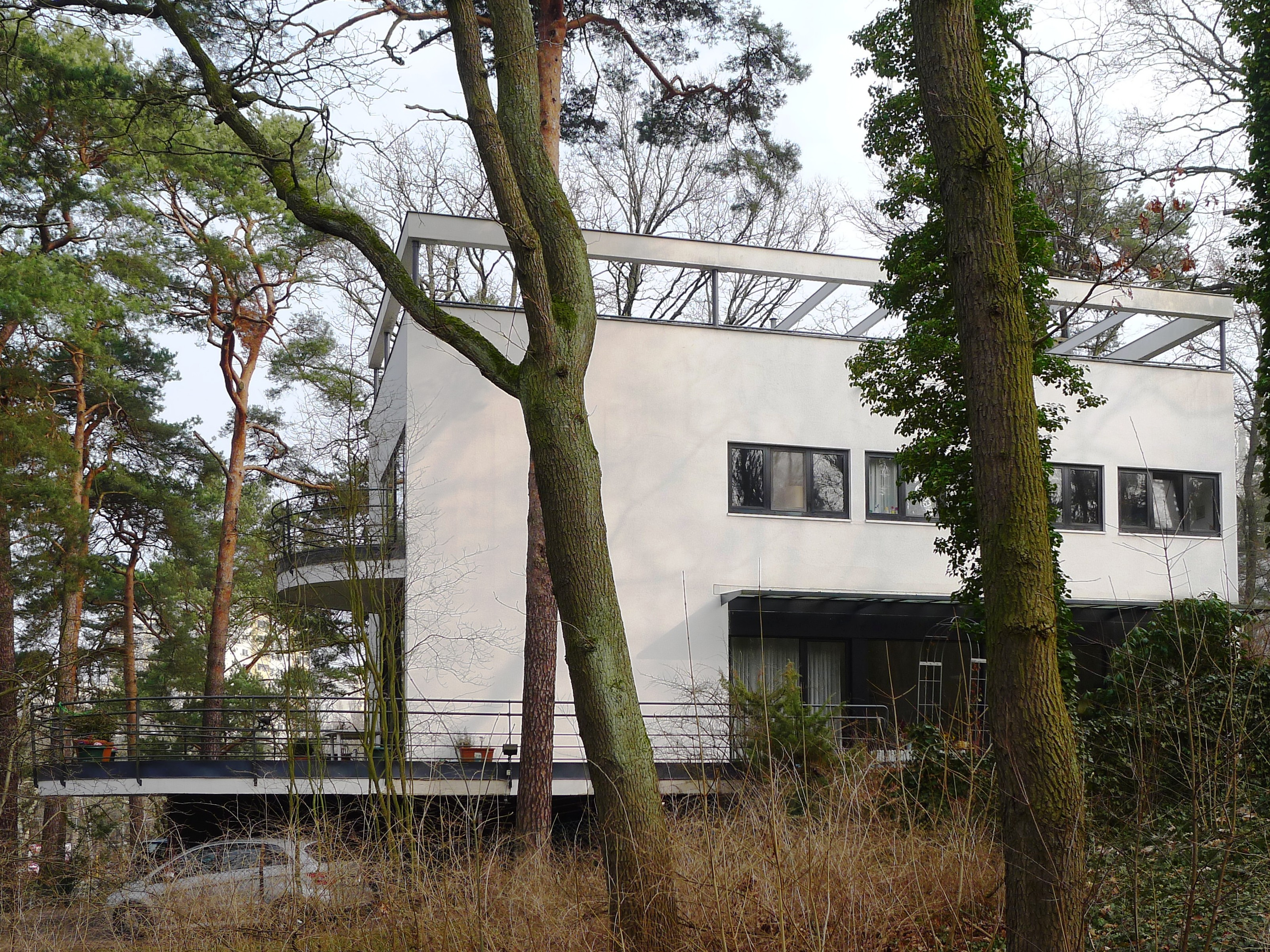 Wohnhaus